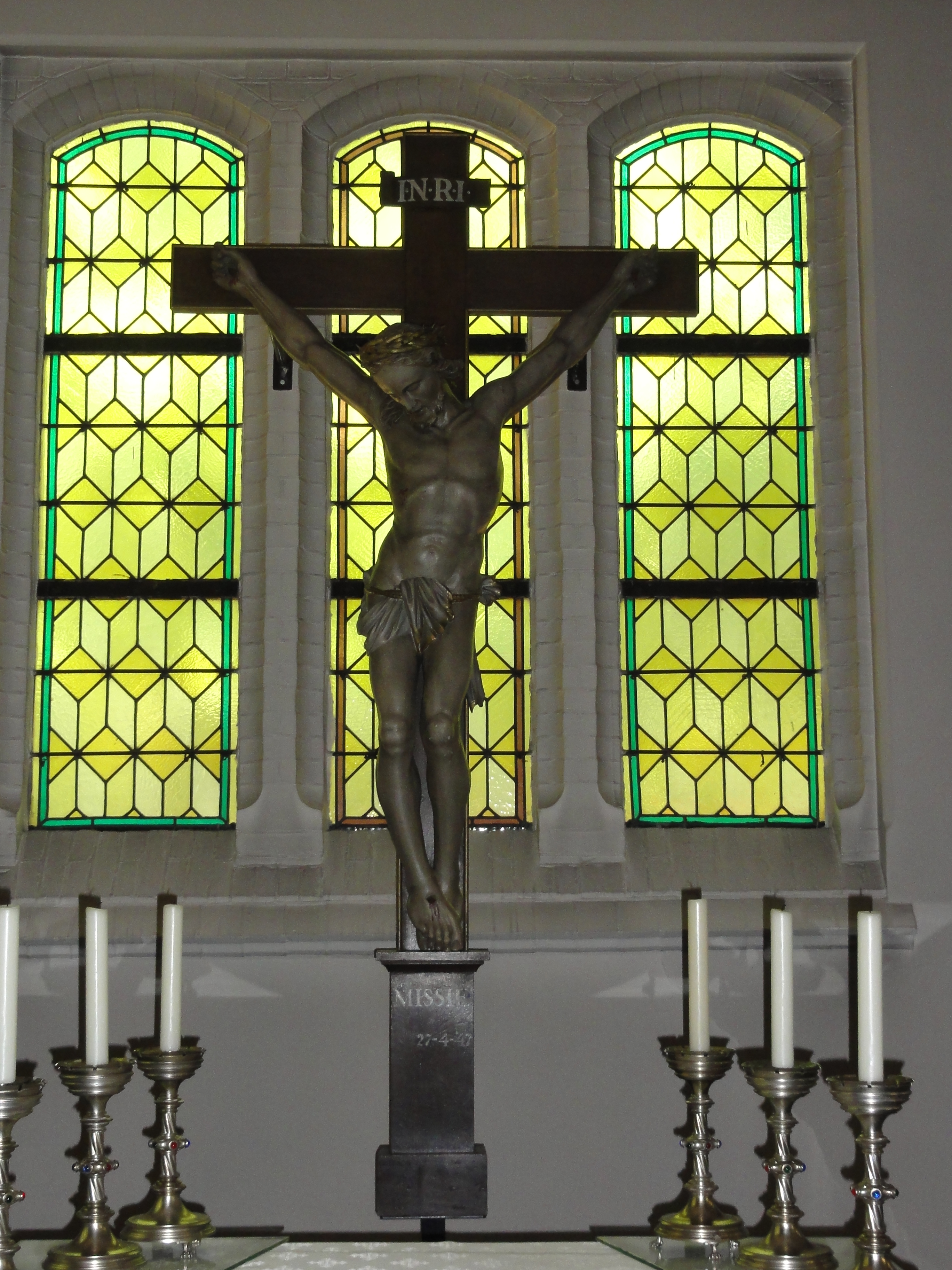 Handel (Gemert-Bakel) Kerk O.L.V. ten Hemelopneming missiekruis